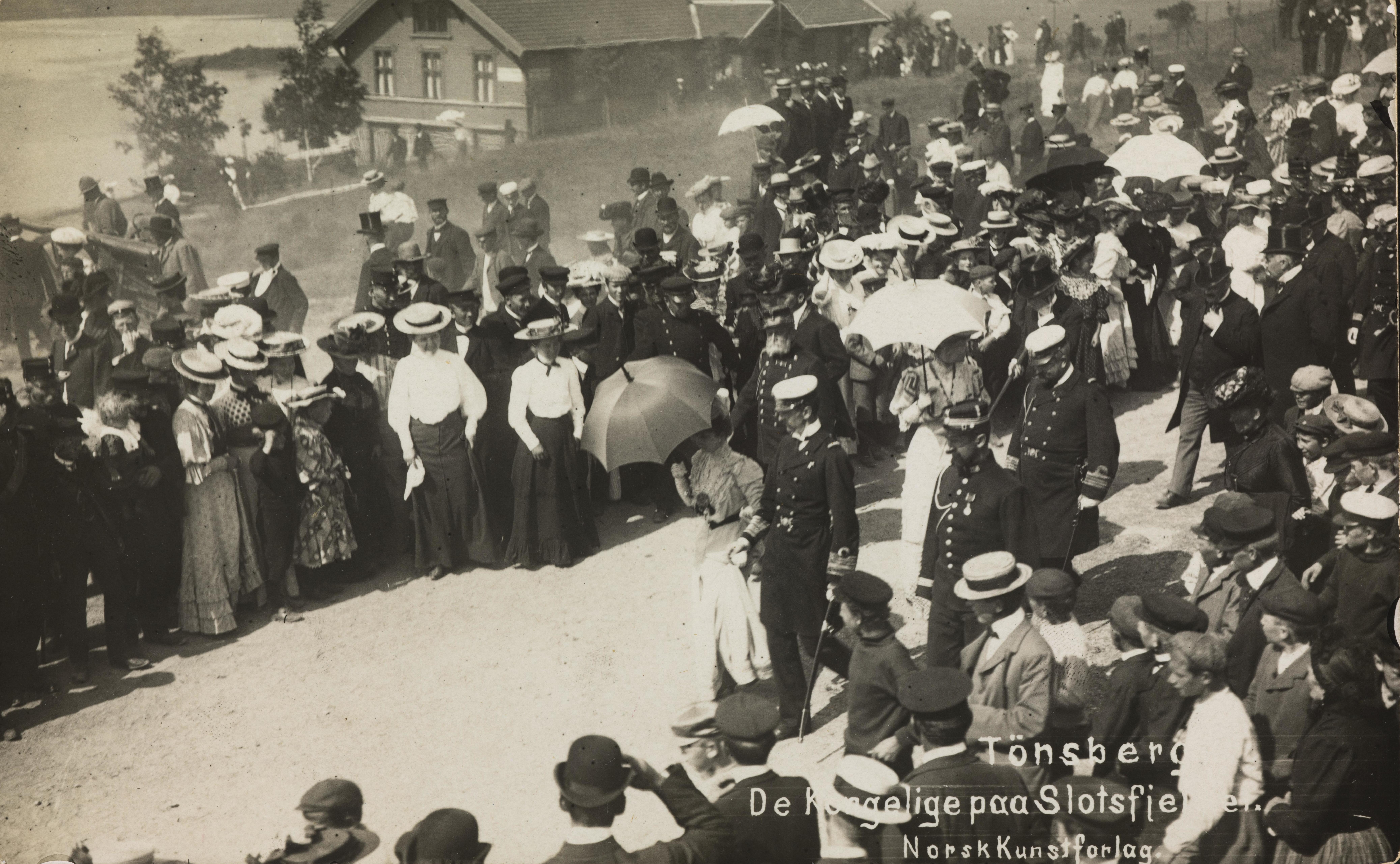 Bildet er hentet fra Nasjonalbibliotekets bildesamling. Anmerkninger til bildet var: Kongeparets besøk i Tønsberg fant sted 1. august 1906. Kongen skrev sitt navn på en steintavle på Slottsfjellet, en tradisjon som er videreført av hans etterfølgere. Slottsfjellet, Tønsberg, Vestfold. Kong Haakon og dronning Mauds besøk i Tønsberg under signingsferden 1. august 1906 er omtalt på sidene 1106–1108 i Tønsbergs historie. 3:2 : Tidsrummet ca. 1880 - ca. 1940. Depicted person: Haakon VII konge av Norge Depicted person: Maud dronning av Norge